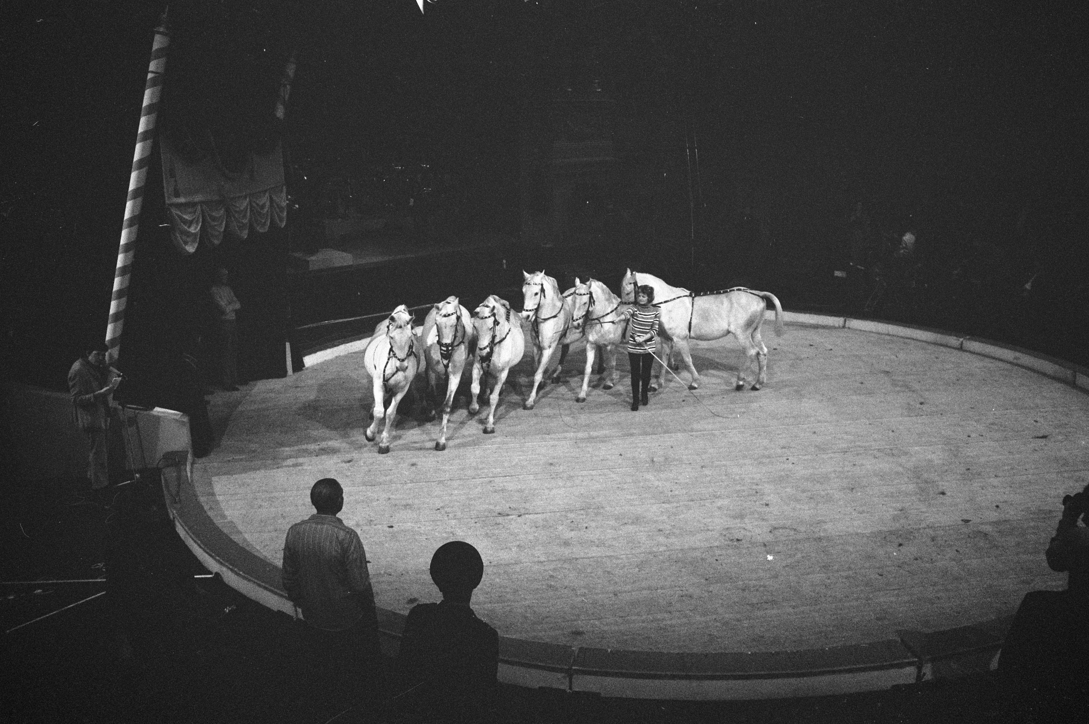 Collectie / Archief : Fotocollectie Anefo Reportage / Serie : [ onbekend ] Beschrijving : Artiesten treden op met circusnummers in Nationaal Songfestival in Carré, Amsterdam; tijdens repetitie Mieke Telkamp met paarden Datum : 15 februari 1972 Locatie : Amsterdam, Noord-Holland Trefwoorden : ARTIESTEN, PAARDEN, circussen Persoonsnaam : Telkamp, Mieke Instellingsnaam : Nationaal Songfestival Fotograaf : Verhoeff, Bert / Anefo, [onbekend] Auteursrechthebbende : Nationaal Archief Materiaalsoort : Negatief (zwart/wit) Nummer archiefinventaris : bekijk toegang 2.24.01.05 Bestanddeelnummer : 925-3871